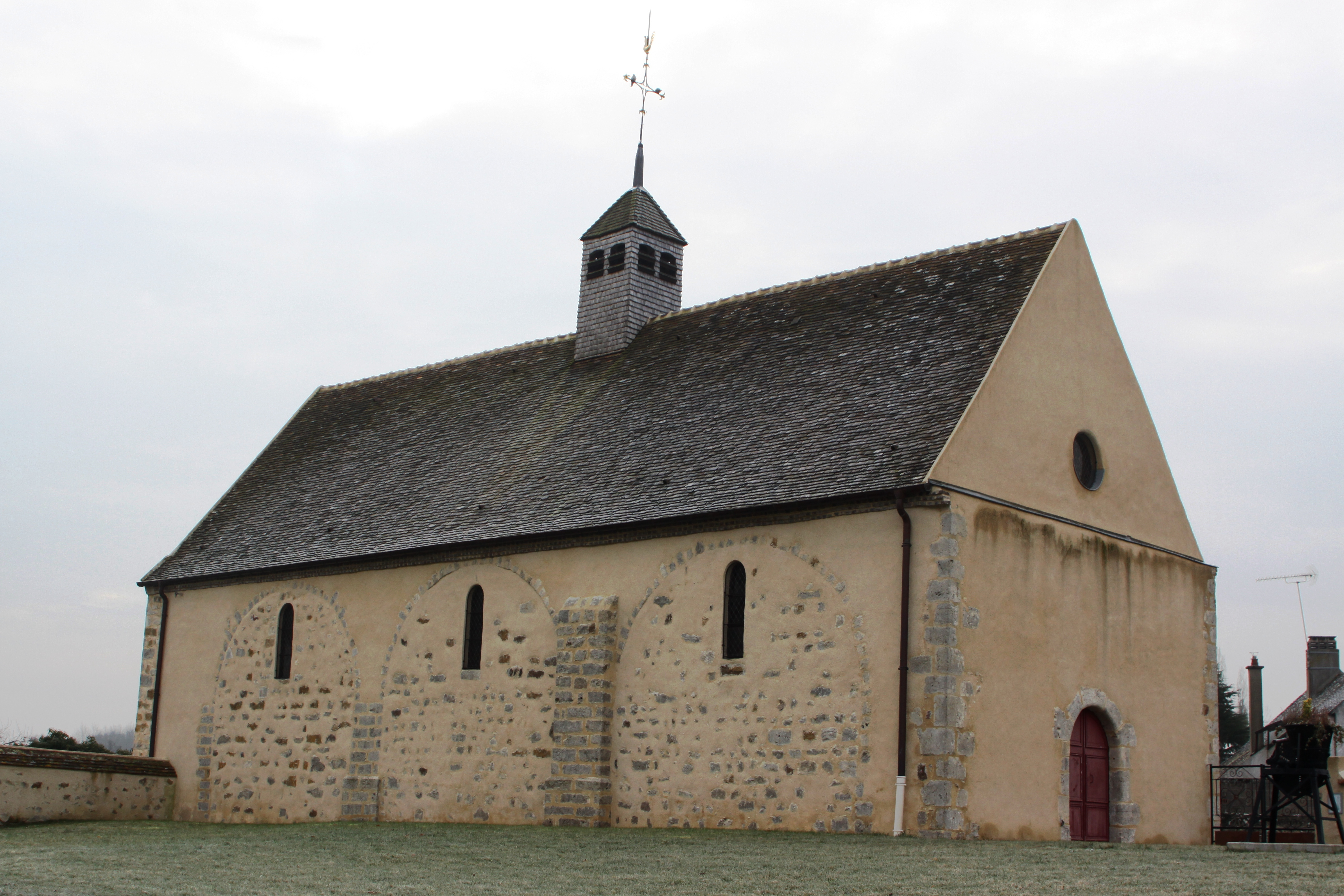 D'Kierch vu Foucherolles